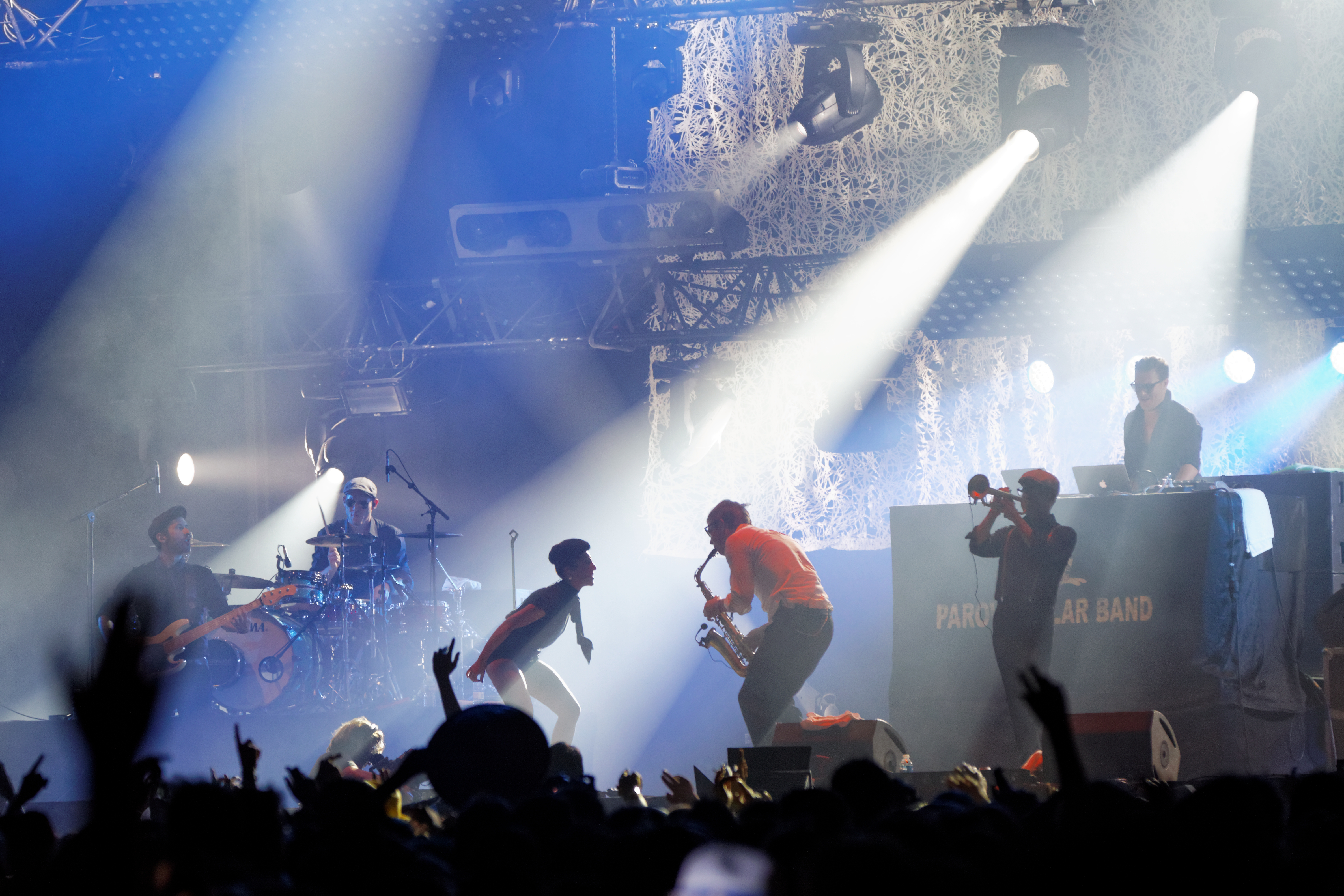 Parov Stelar Band en concert sur la grande scène lors de la fête de l'Humanité 2012.